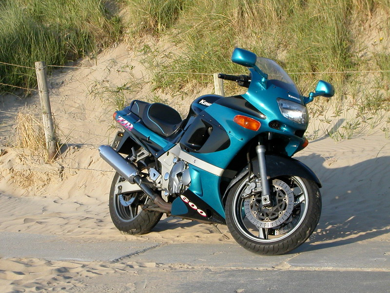 Kawasaki ZZ-R 600, model 1993 N.B., not an original sadle, but a Corbin sadle.